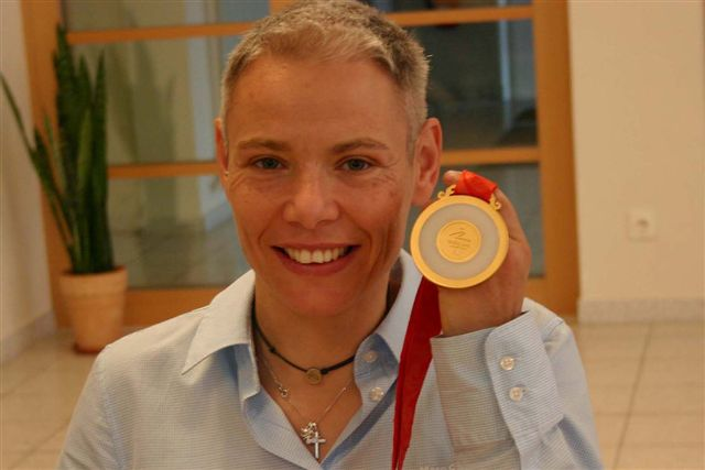 Andrea Eskau, glücklich über die Goldmedaille